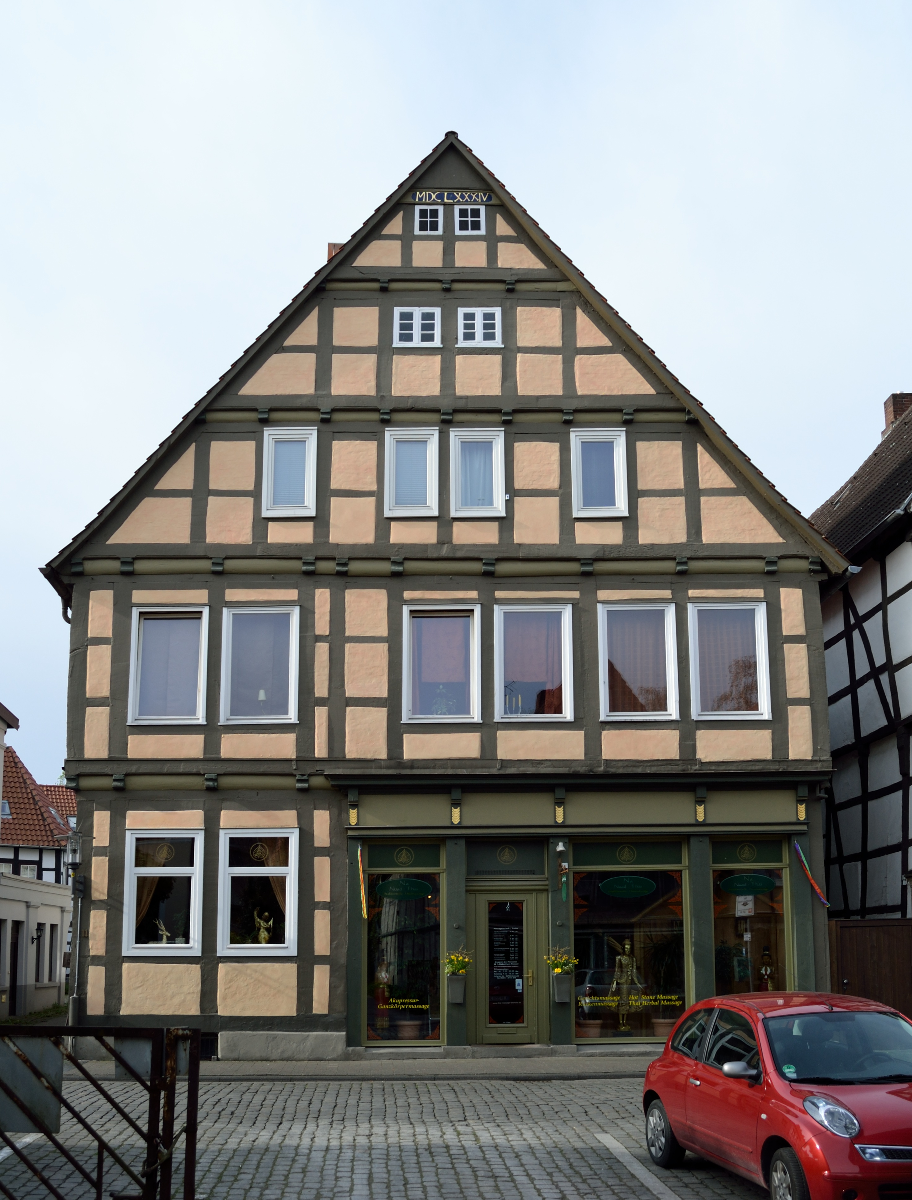 Baudenkmal Detmold Nr. 347 - Fachwerkgiebelhaus, erbaut 1684 Exterstraße 11